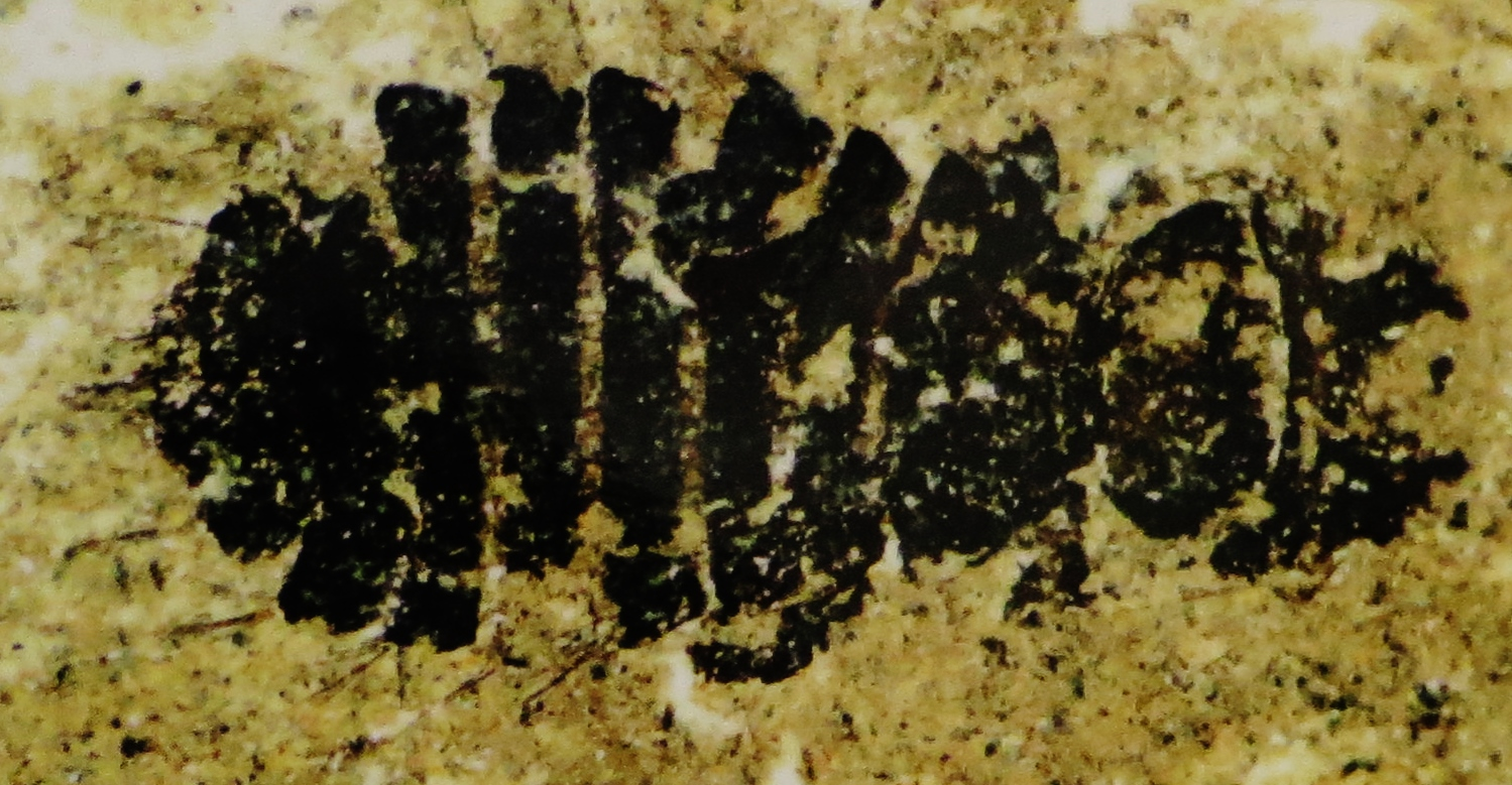 Fossil of Megamenopon- Took the picture at Natural History Museum, Mainz